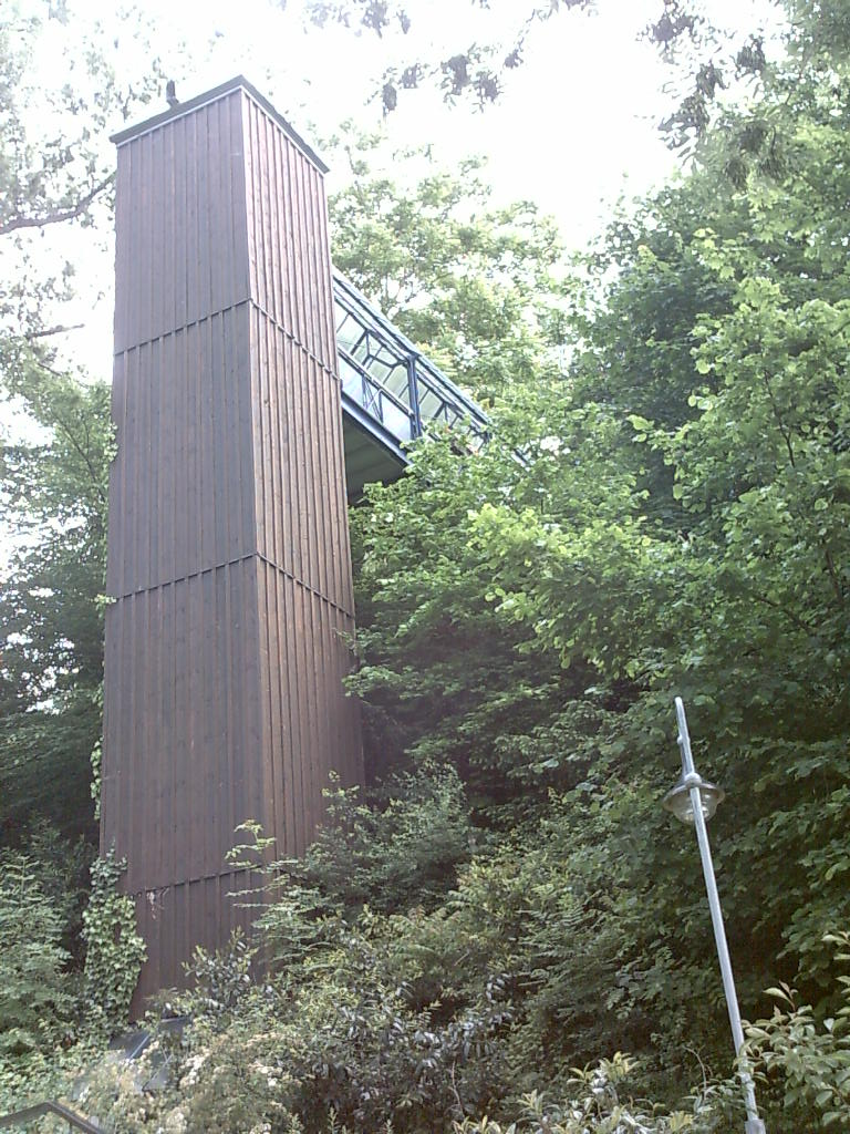 Lift, der die Oberstadt von Bad Bellingen mit dem Kurbezirk verbindet